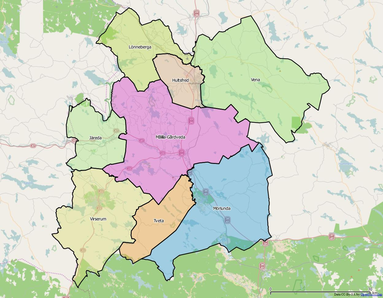 Distriktsindelningen i Hultsfreds kommun